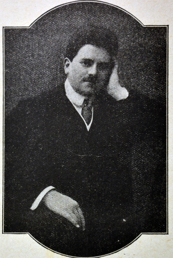 Erich J. Wolff, Komponist